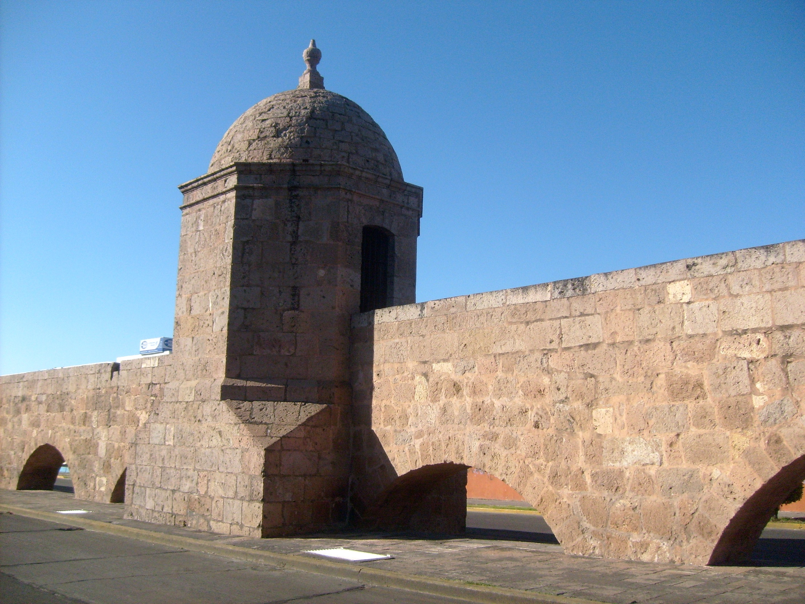 Acueducto de Morelia en la ciudad de Morelia, Michoacán, México. Esta parte del acueducto aparece en los billetes mexicanos de 50 pesos.